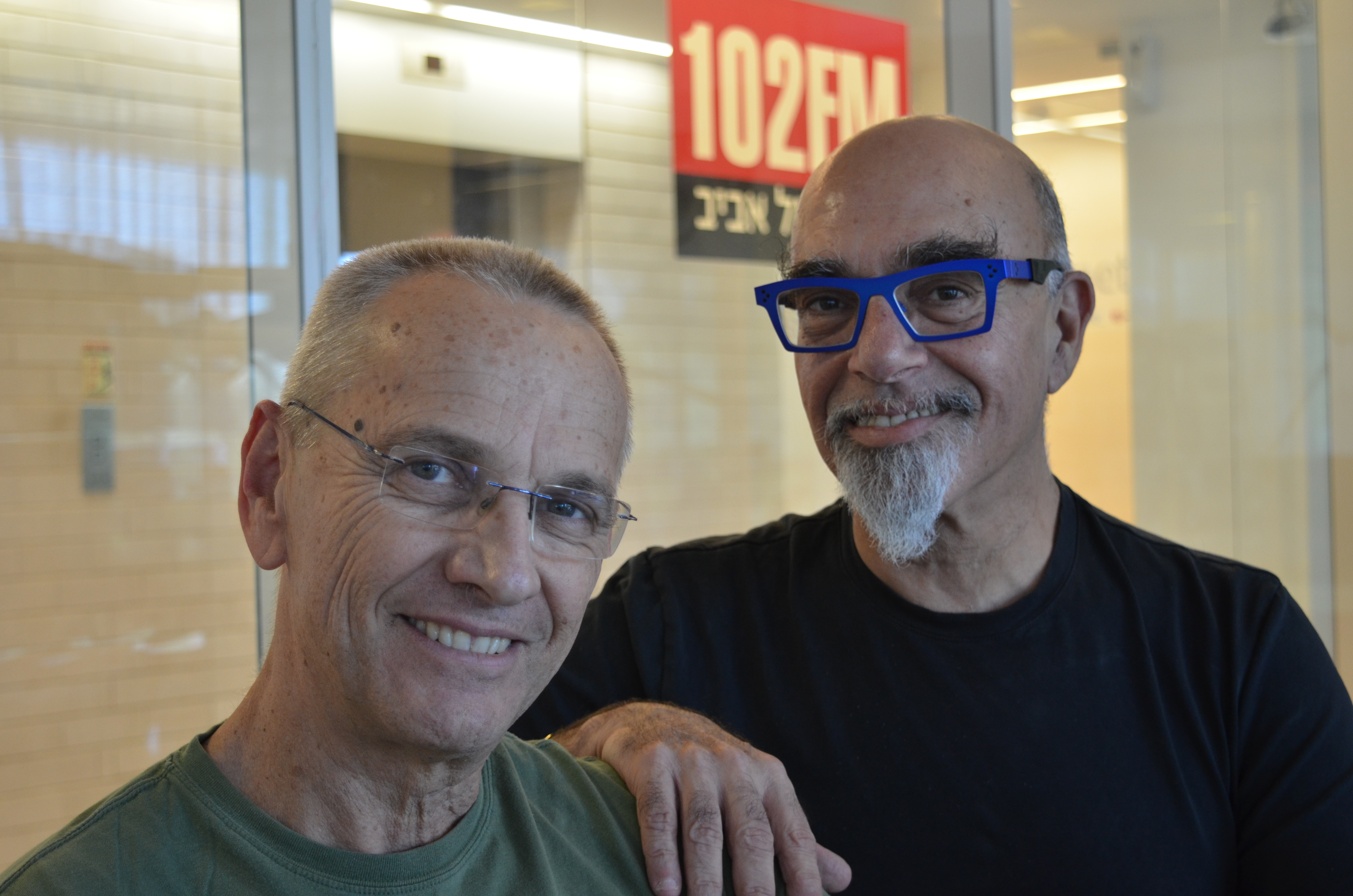 ישראל אהרוני ונלי שפר בתכנית "תעודת עיתונאי" ברדיו תל אביב (2014)